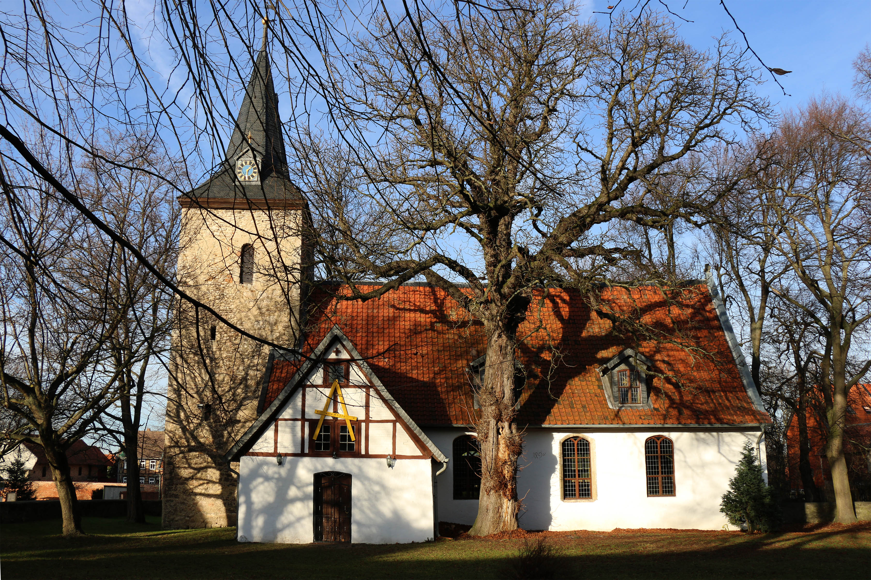 Blick auf die Dorfkirche in Osterode am Fallstein